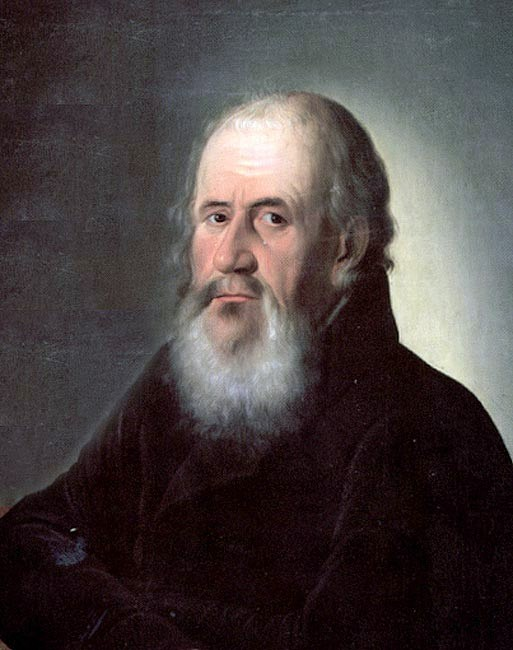 Портрет иркутского купца 1-й гильдии Петра Дмит­риевича Трапезникова (1747—1815). Портрет с мальчиком ху­дожника Калмынина (ко­пия с работы неизвестного ав­тора) хранится в Иркутском областном художественном музее, см. Приложения к книге История Сибири. // .